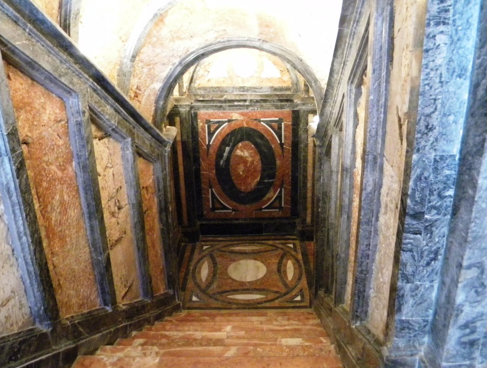 Escaleras de acceso a la cripta de los duques del Infantado en el convento de San Francisco (Guadalajara, España).